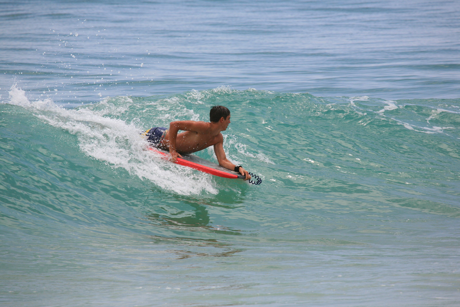 Bodyboarding in Salema Portugal June 2006